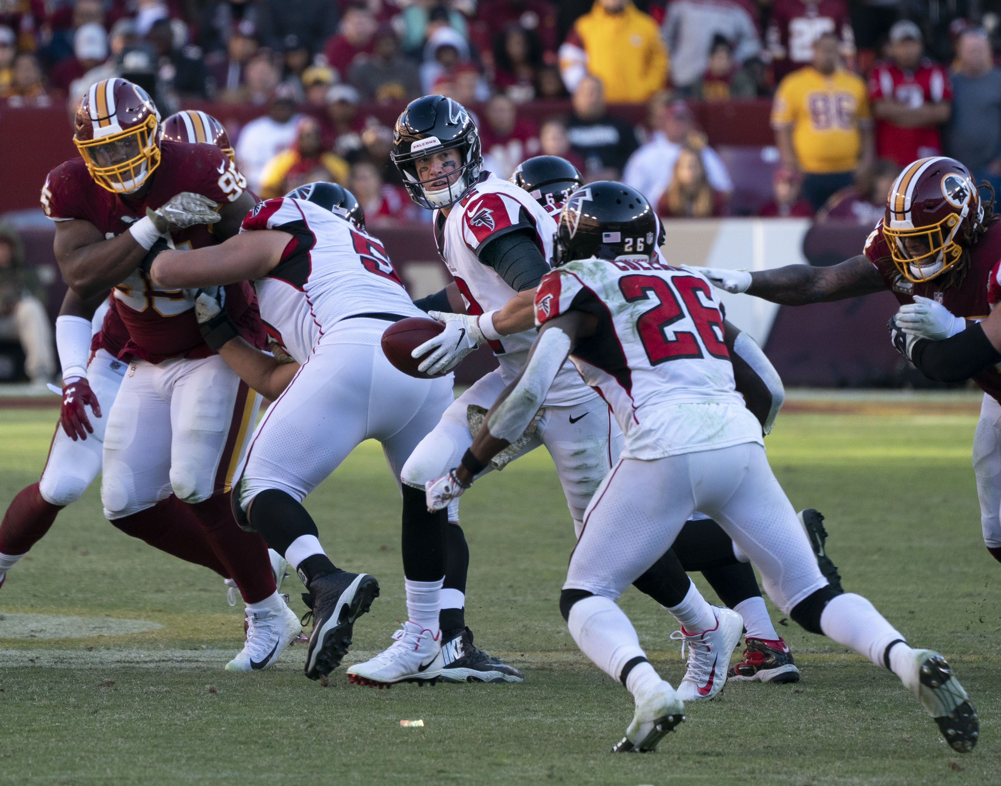 Falcons at Redskins 11/04/18